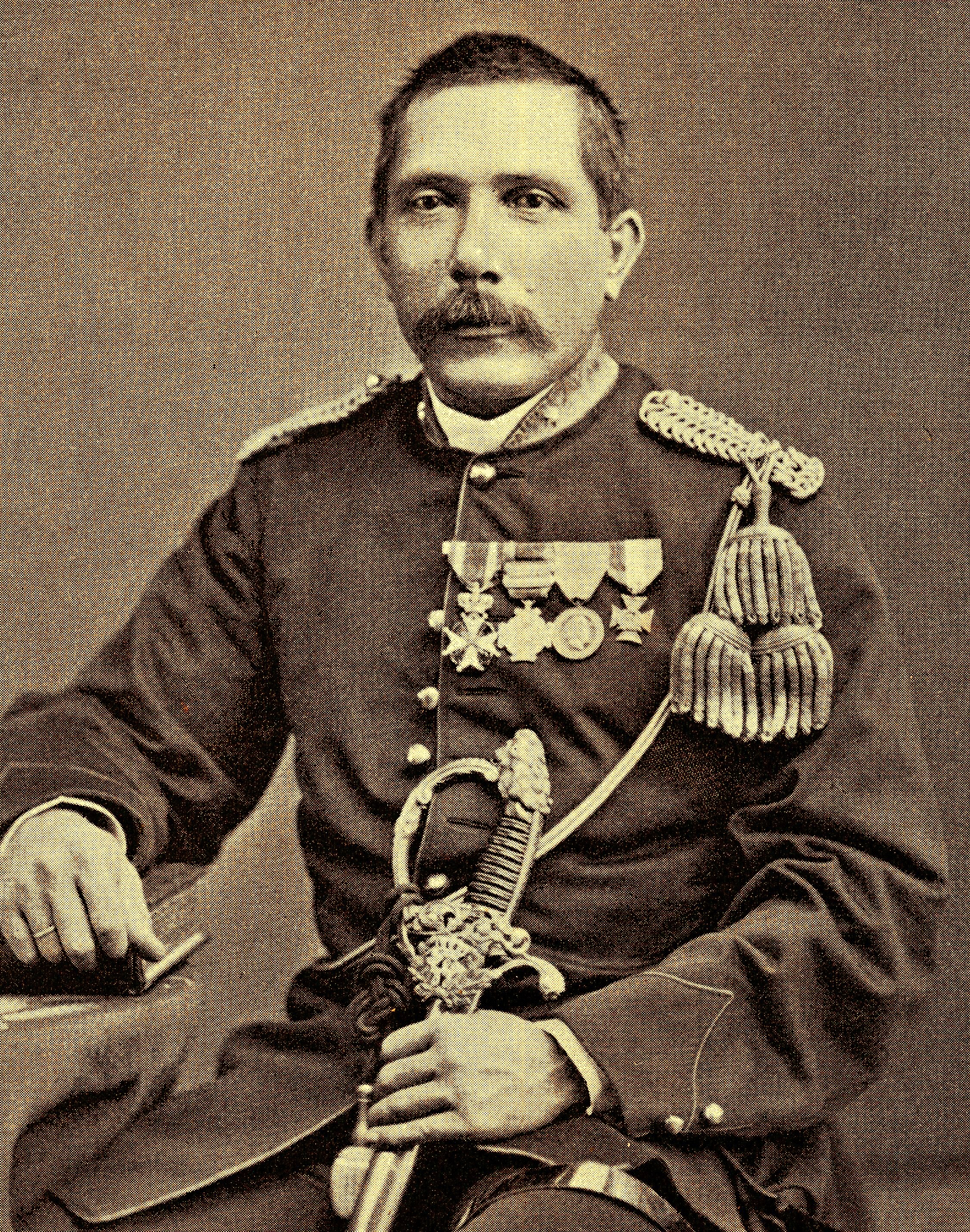 Marinus Segov (1841-1923), Dutch army officer.